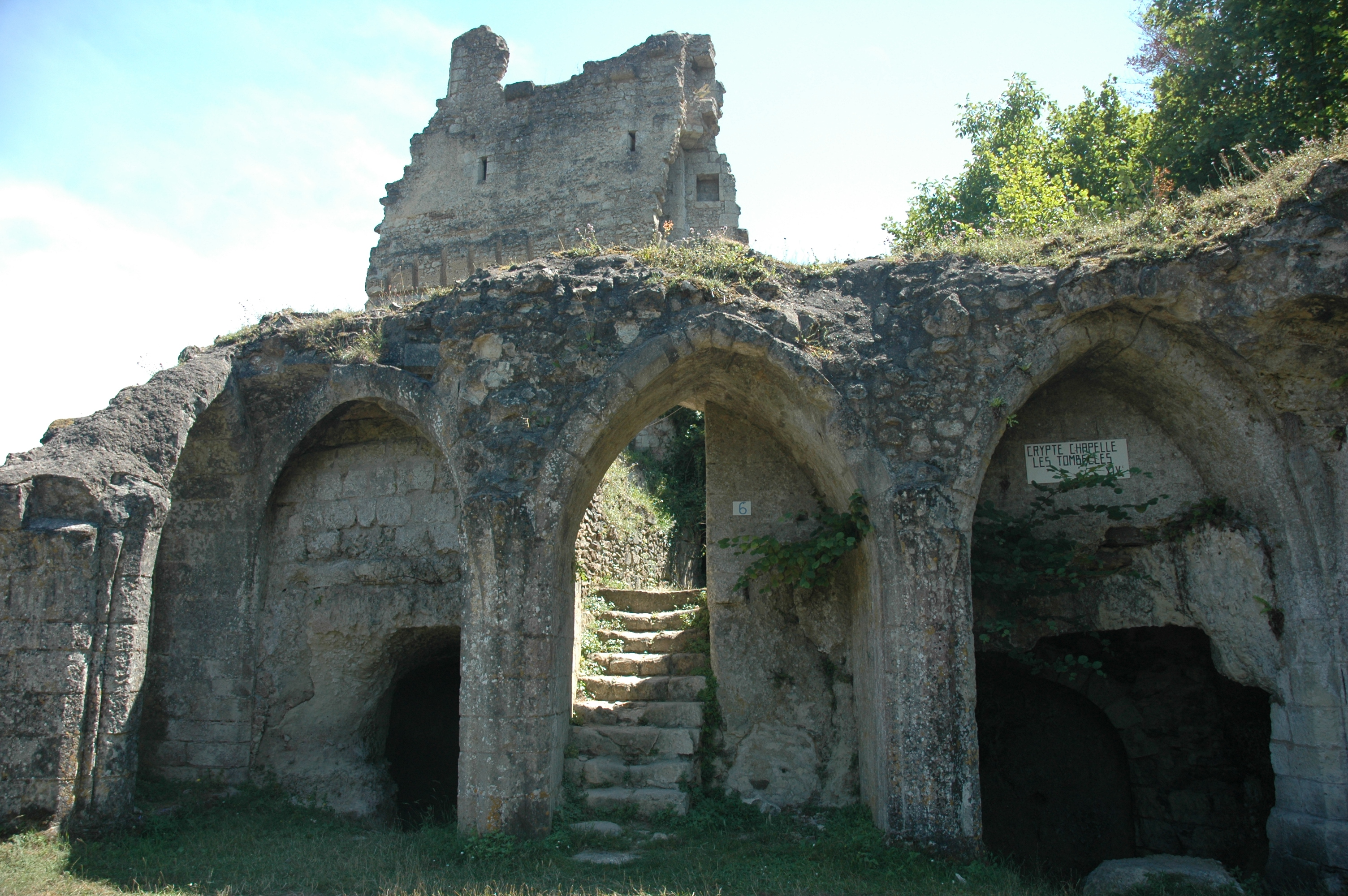 France Loir-et-Cher Lavardin Le château (crypte) Photographie prise par GIRAUD Patrick